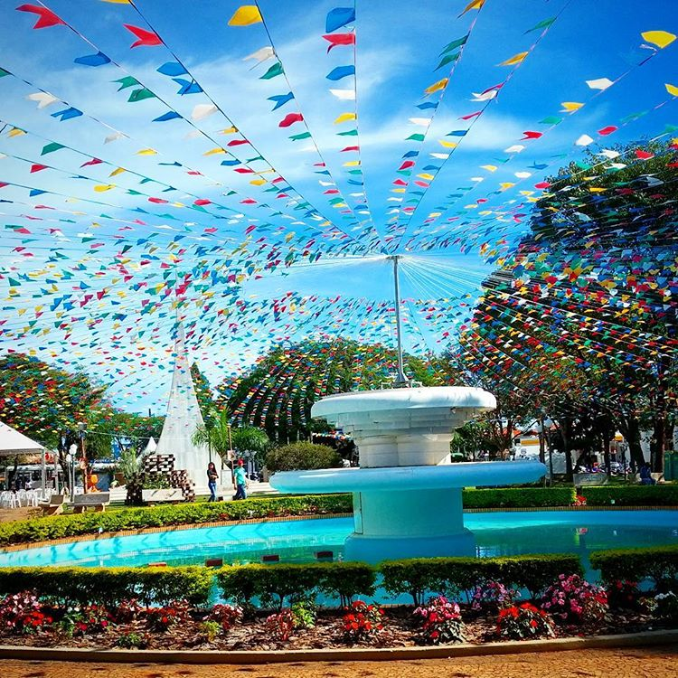 Praça Barão de Araras decorada para as festividades juninas em 2017.